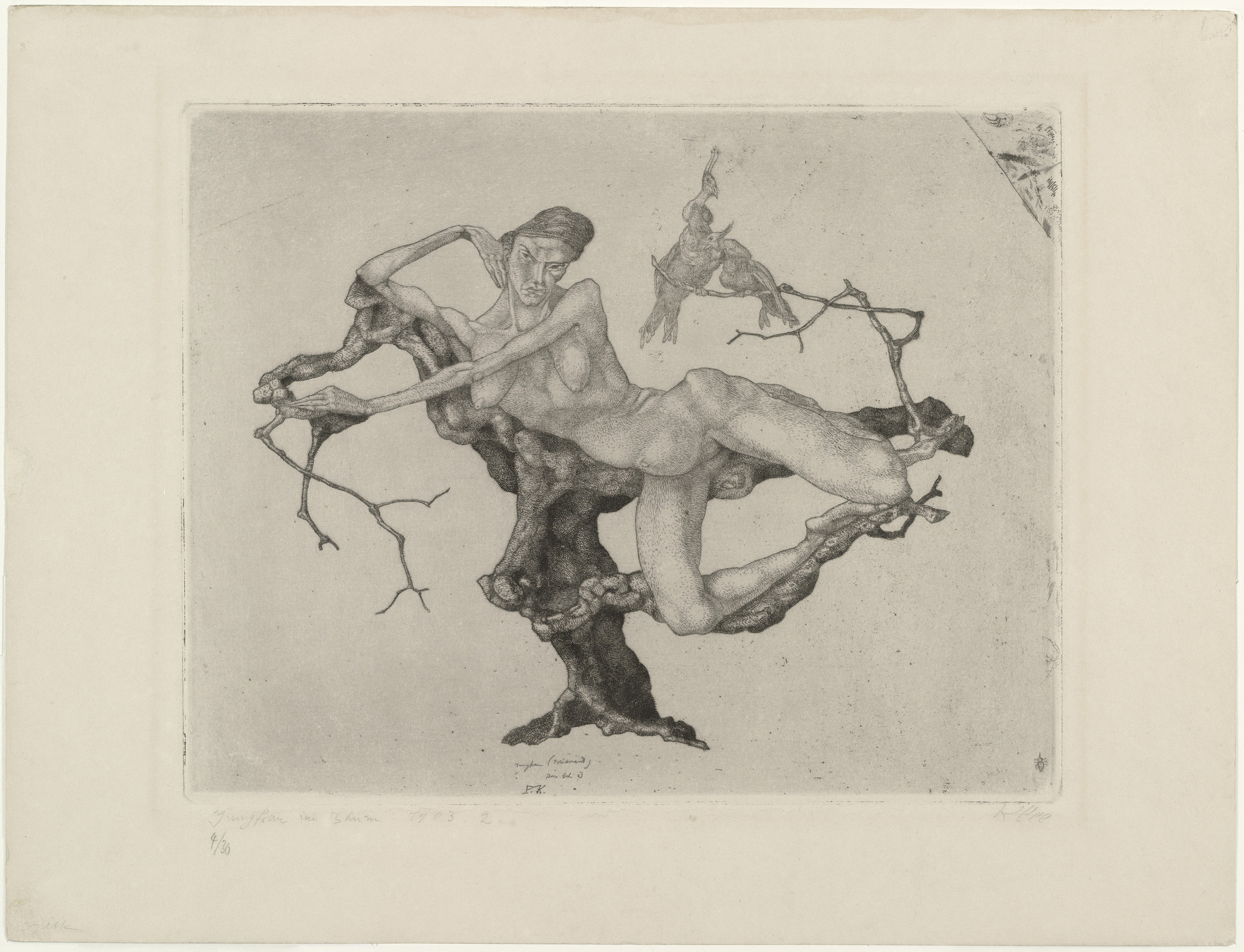 Inventionen Nr 3, Jungfrau im Baum, Radierung. Museum of Modern Art, New York